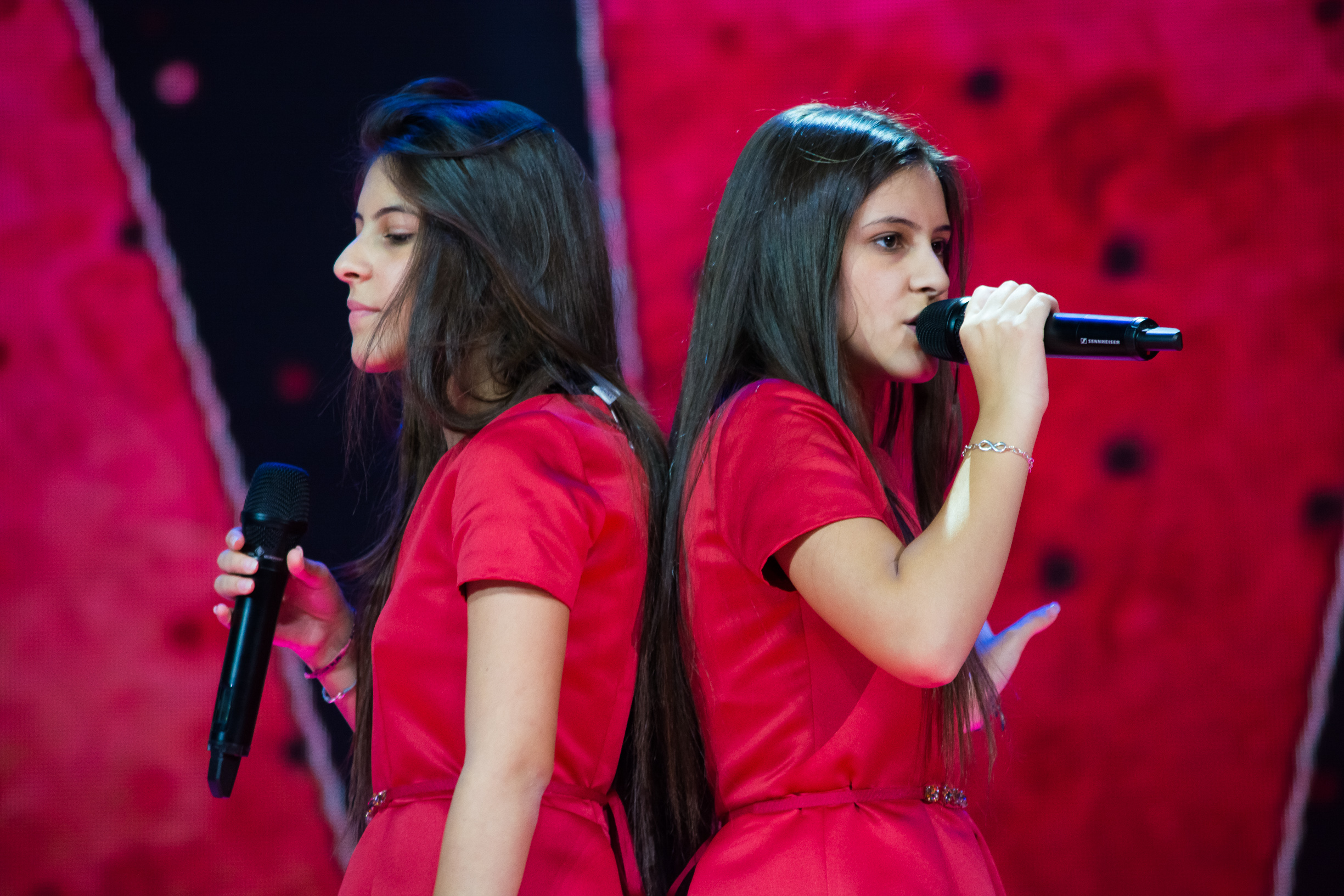 Кьяра и Мартина Скарпари на сцене Детского Евровидения 2015 («Армеец», София) во время генеральной репетиции